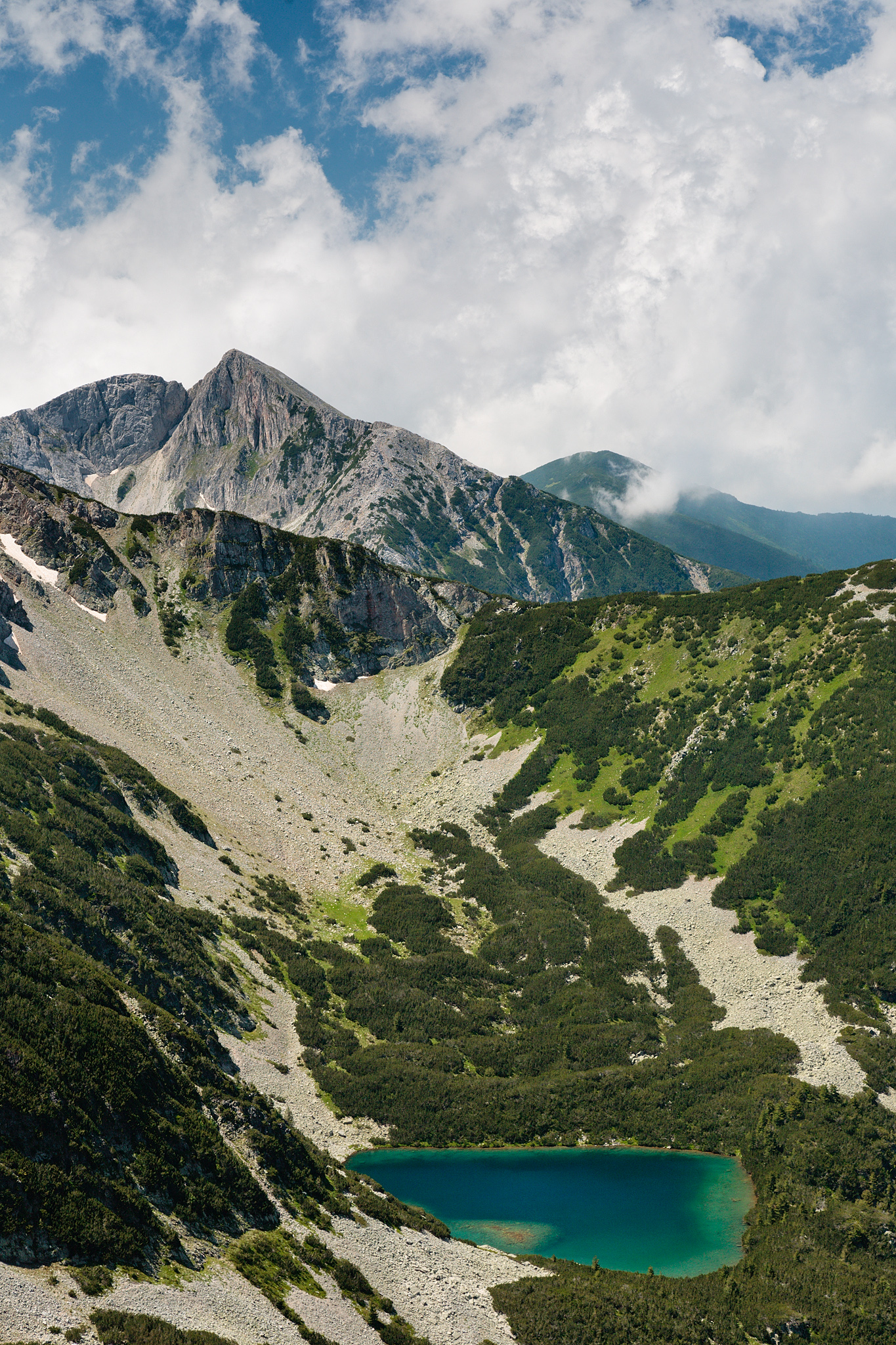 Пирин, Пирин, едно от Гергийските езера и в. Синаница